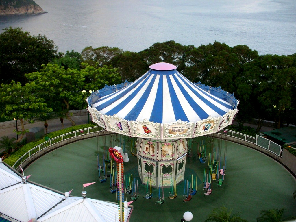 Flying Swing, Hong Kong Ocean Park 香港海洋公園飛天鞦韆